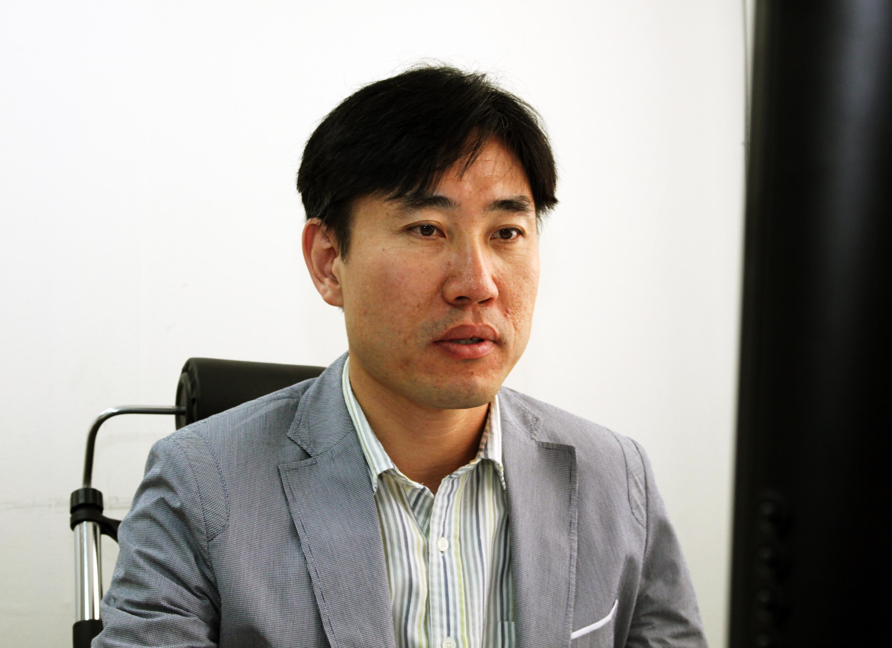 열린북한방송 하태경 대표